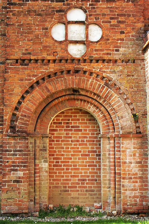 spätromanisches seitliches Kirchenportal der Dorfkirche Lübow